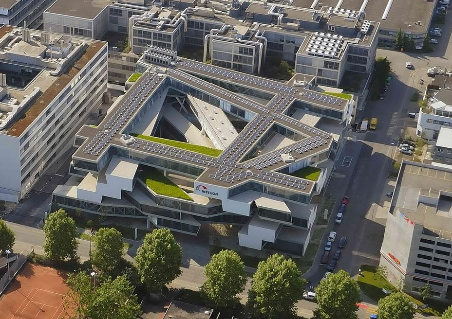 Actelion-Gebäude in Allschwil, Schweiz